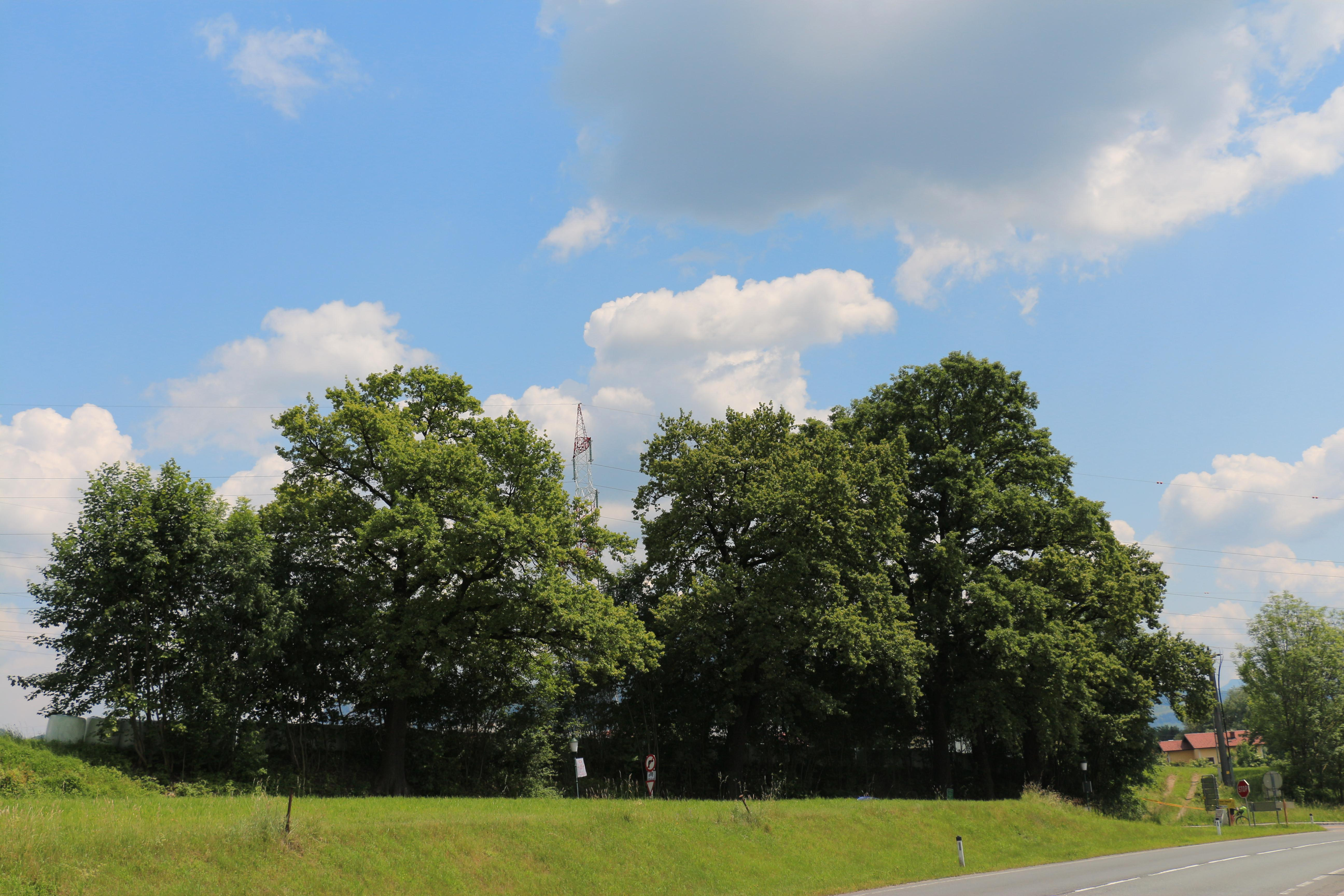 Geschützter Landschaftsteil Eichenbestand bei Hagenau, Gemeinde Bergheim, Land Salzburg This media shows the Geschützter Landschaftsteil in Salzburg with the ID GLT00094.